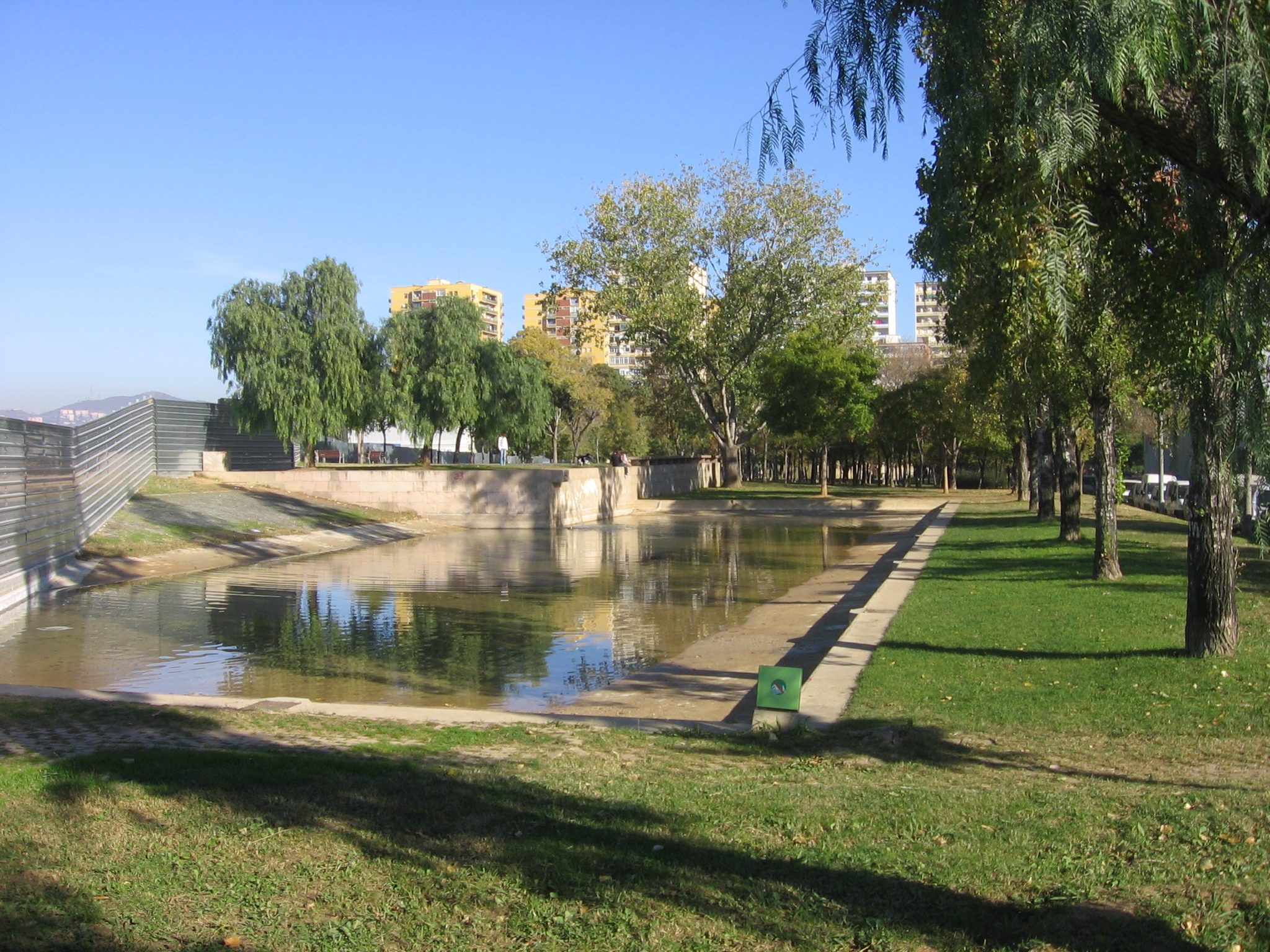 Parque de Sant Martí.